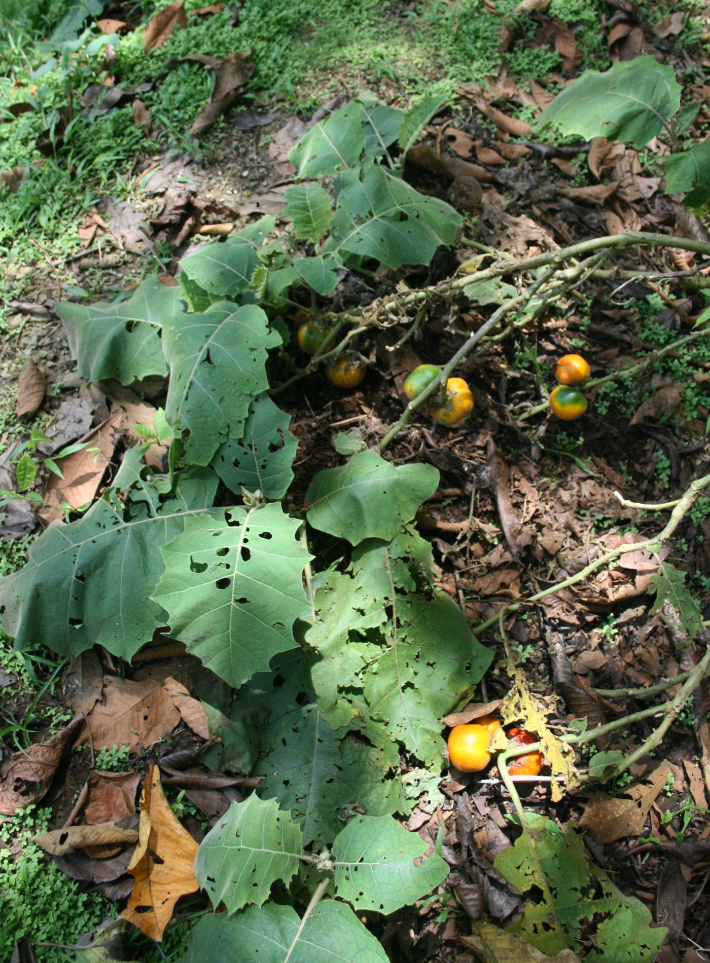 Solanum sessiliflorum, Nachtschattengewächse (Solanaceae) - Costa Rica: Prov. Puntarenas, La Gamba NW Golfito, "Laguna" zwischen "Tropenstation La Gamba"/"Estación Biológica La Gamba" und "Esquinas Rainforest Lodge"